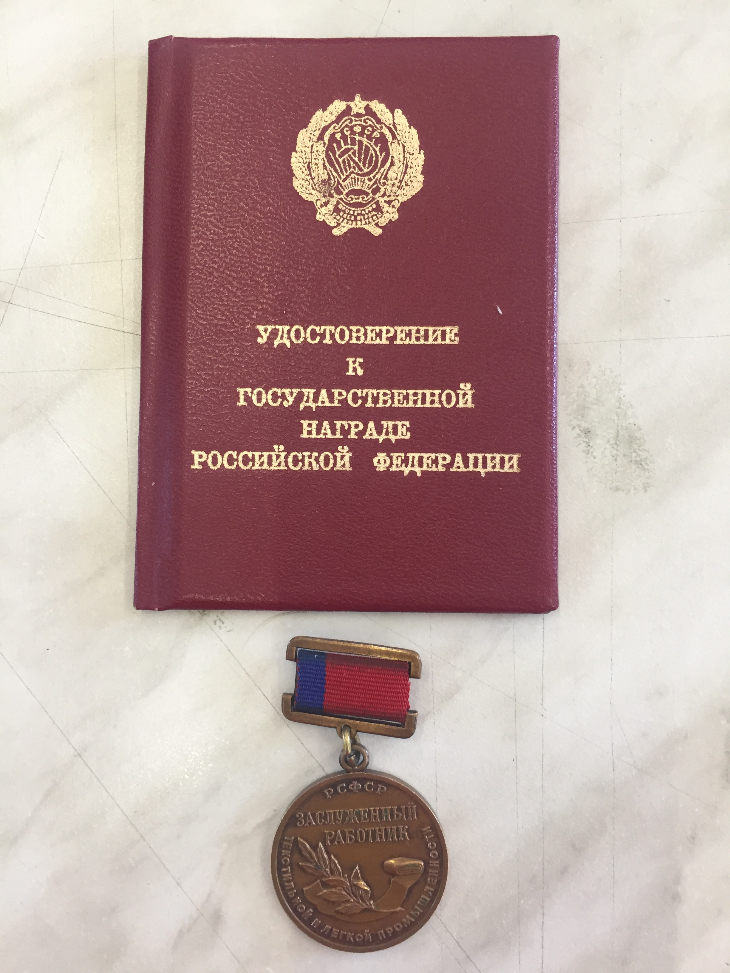 Почётное звание «Заслуженный работник текстильной и легкой промышленности Российской Федерации»